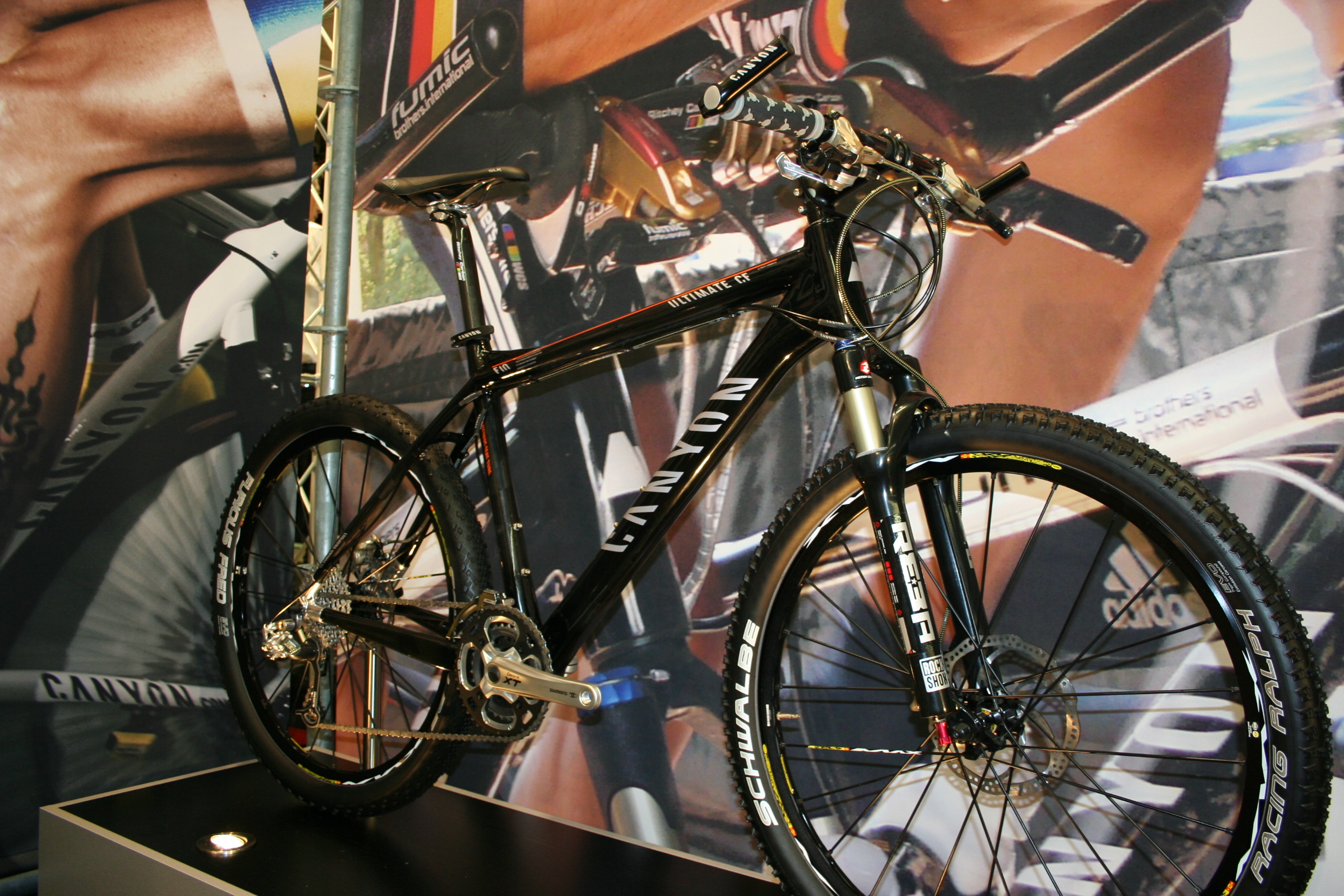 Canyon bike, nl. Canyon Ultimate CF Mountainbike